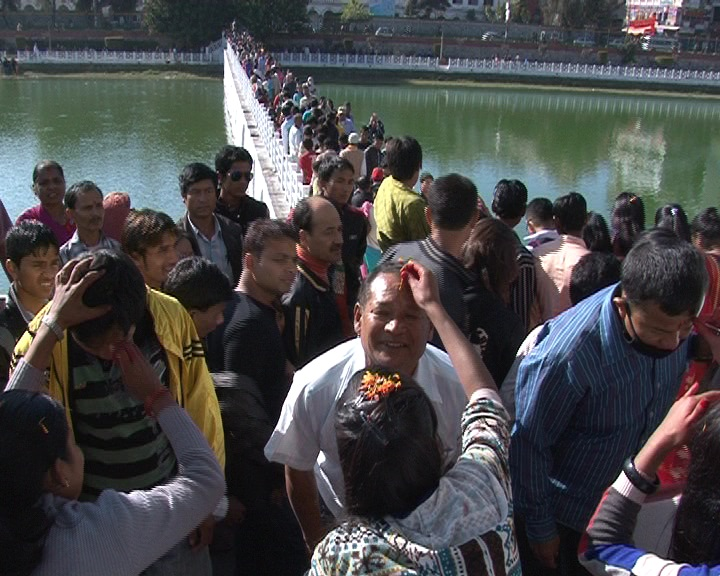 नेपाली: रानिपोखरीमा भाईटिका